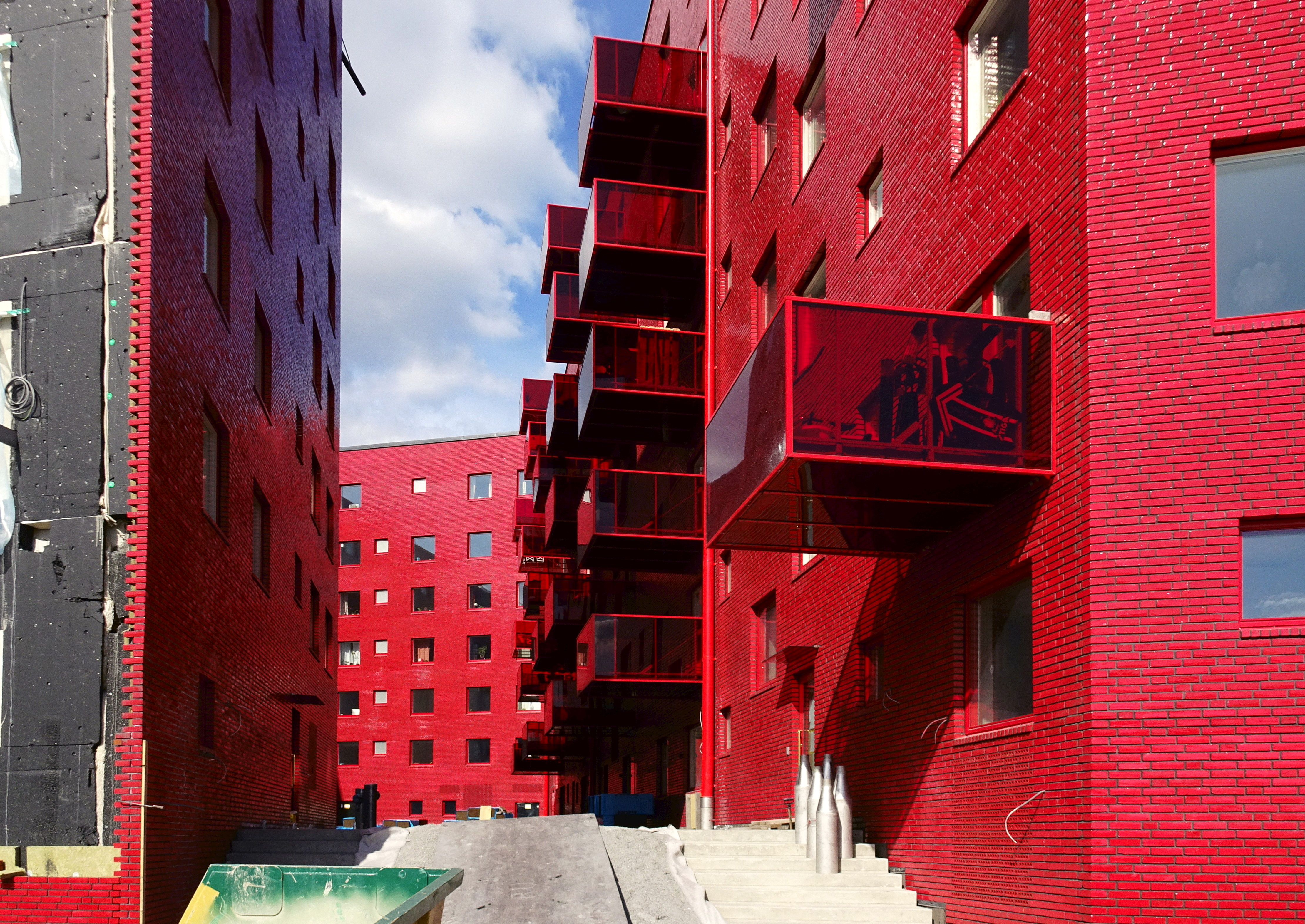 Kvarteret Muddus, Norra Djurgårdsstaden, arkitekt Wingårdh